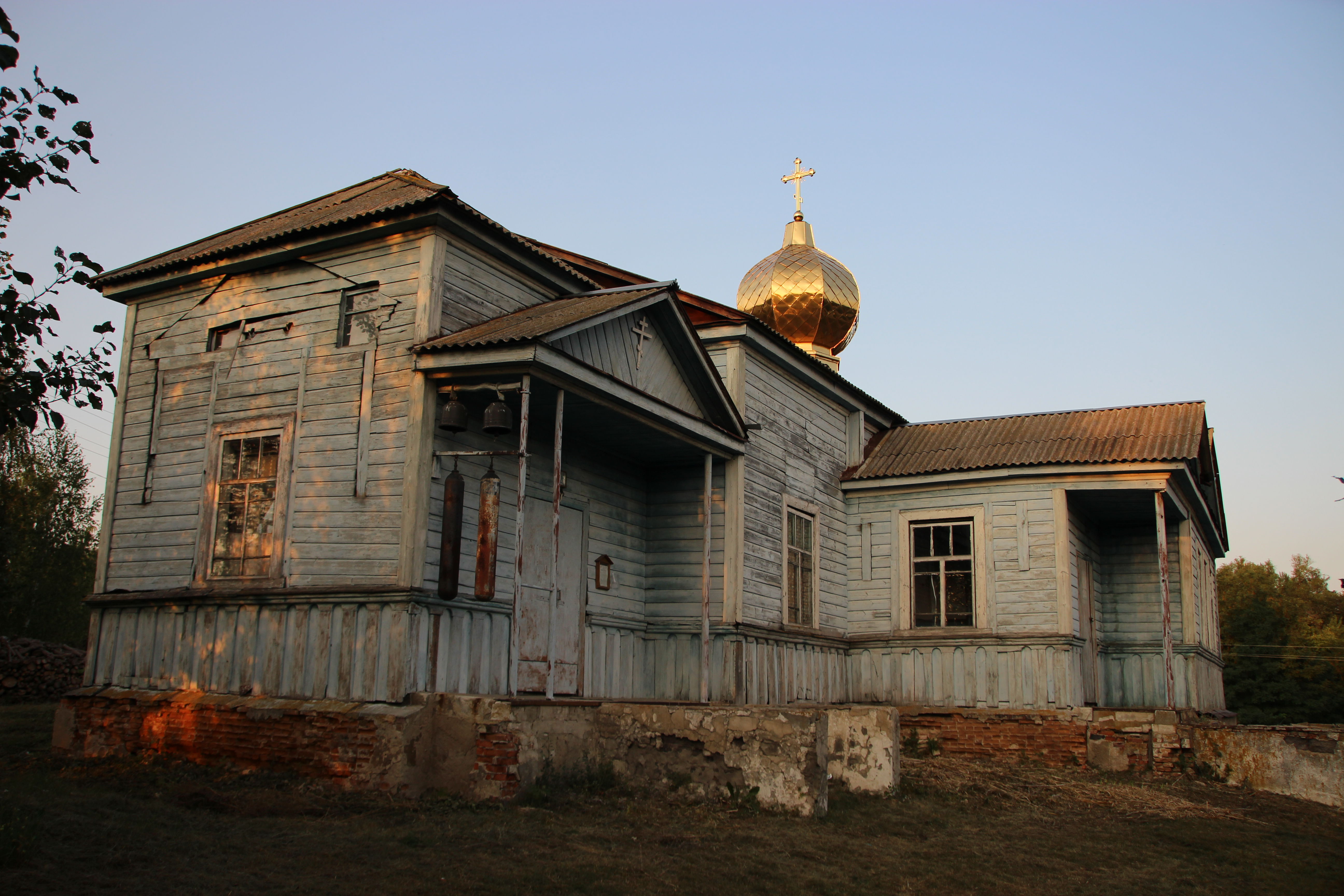 Покровська церква (дер.), село Малий Самбір